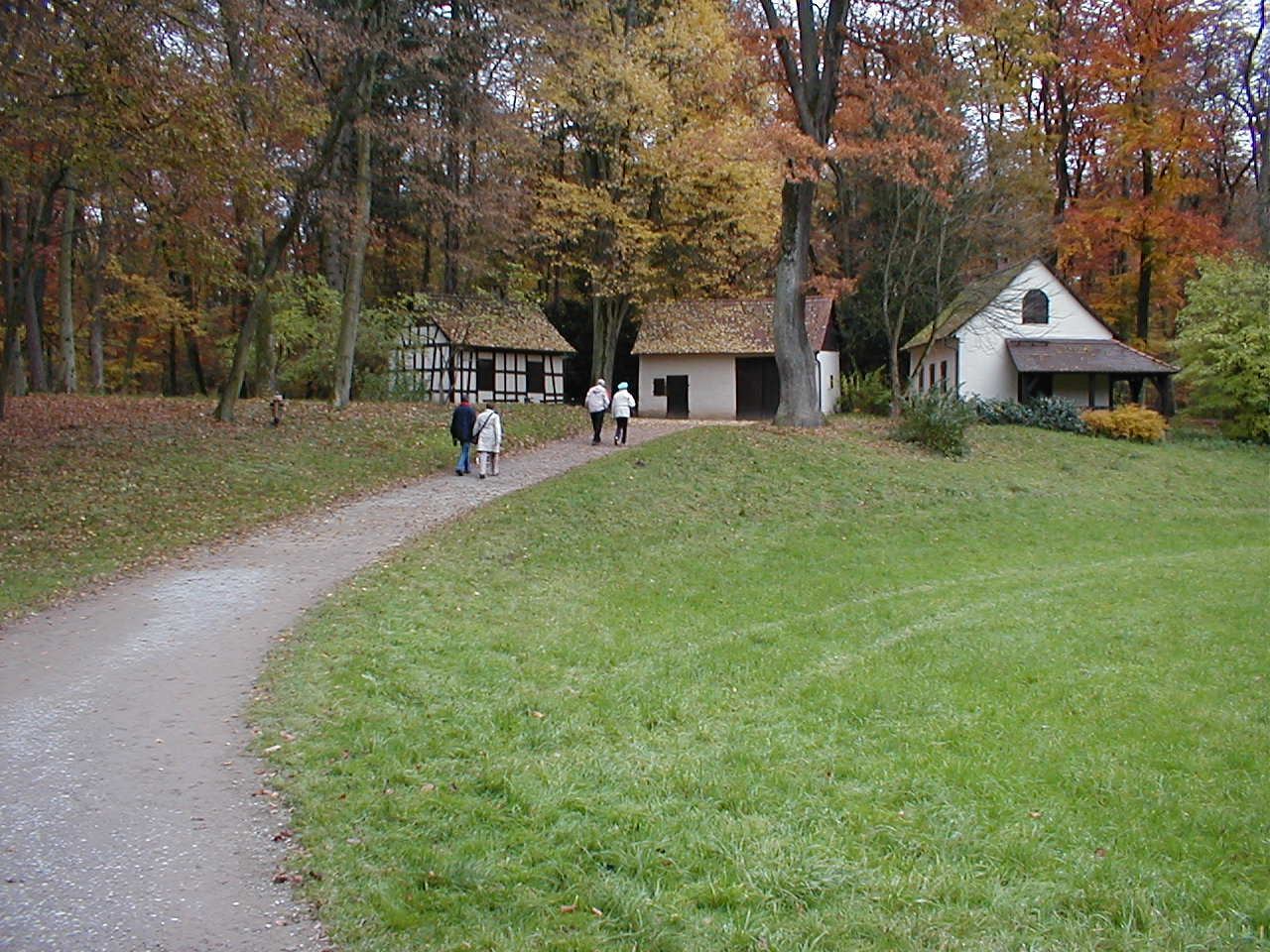 Die "Wacht", Staffagebauten im Park Schönbusch bei Aschaffenburg The "Wacht" ("guard"), staffage buildings in Park Schönbusch, close to Aschaffenburg